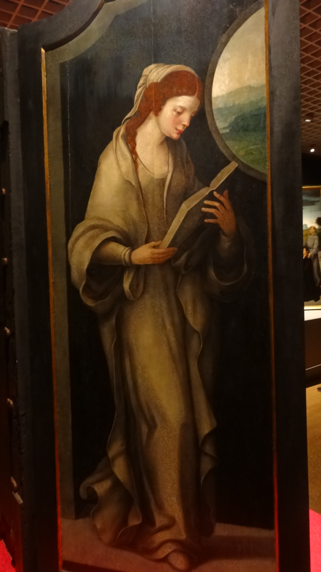 Virgem Maria, reverso do painel esquerdo do Tríptico de S. Tiago Menor e S. Filipe, de cerca de 1527-31, atribuido ao pintor flamengo Pieter Coecke van Aelst, proveniente da Igreja do Socorro, no Funchal, ilha da Madeira